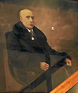 Porträt von Josef Hötte, Münster, Gut Heidhorn, Speicher.